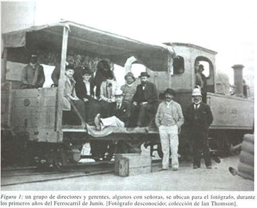 Tren salitrero desde Junin a Oficina Reducto